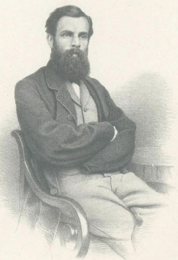 Portret van de kunstschilder Godard Alexander Gerrit Philip Mollinger (1836-1867)